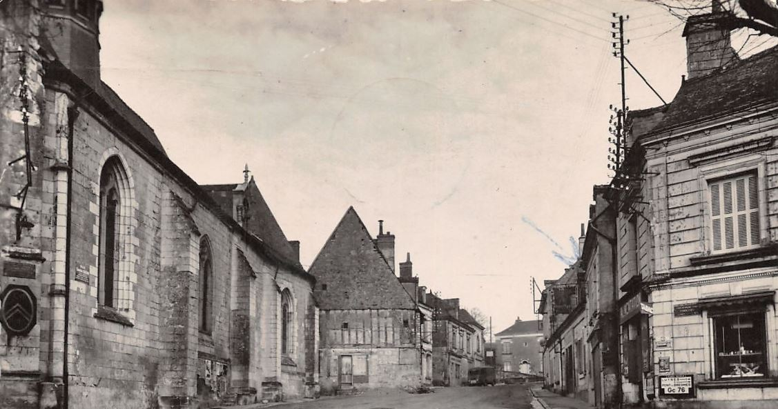 Centre-bourg de Fondettes. Ancienne carte postale.